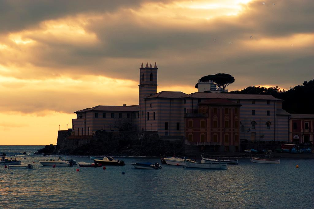 Baia di Portobello a Sestri Levante, Liguria, Italia